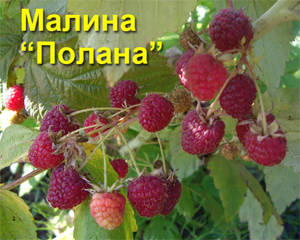 Polana-plod